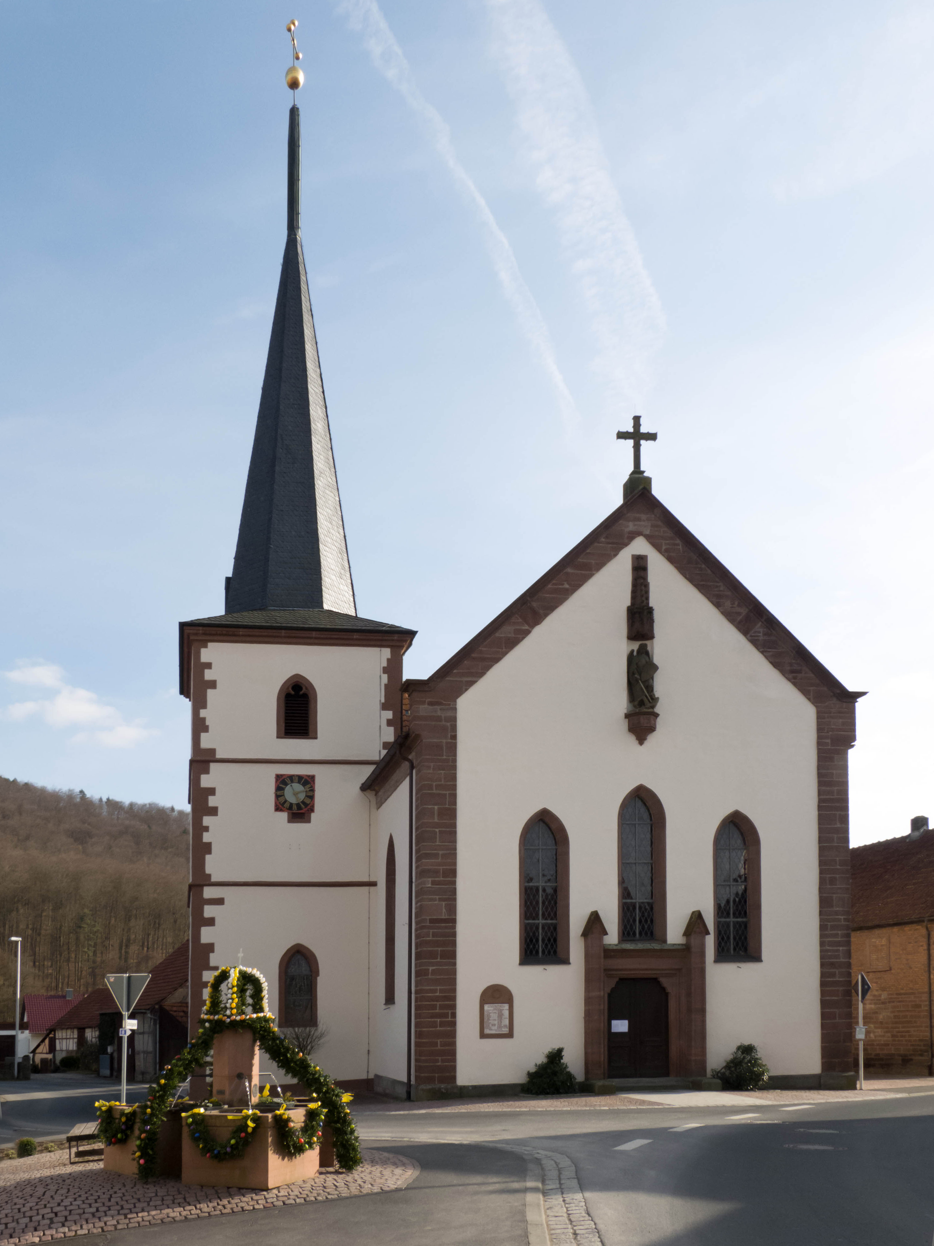 Kirche von der Dorfseite, Zustand um Ostern 2013